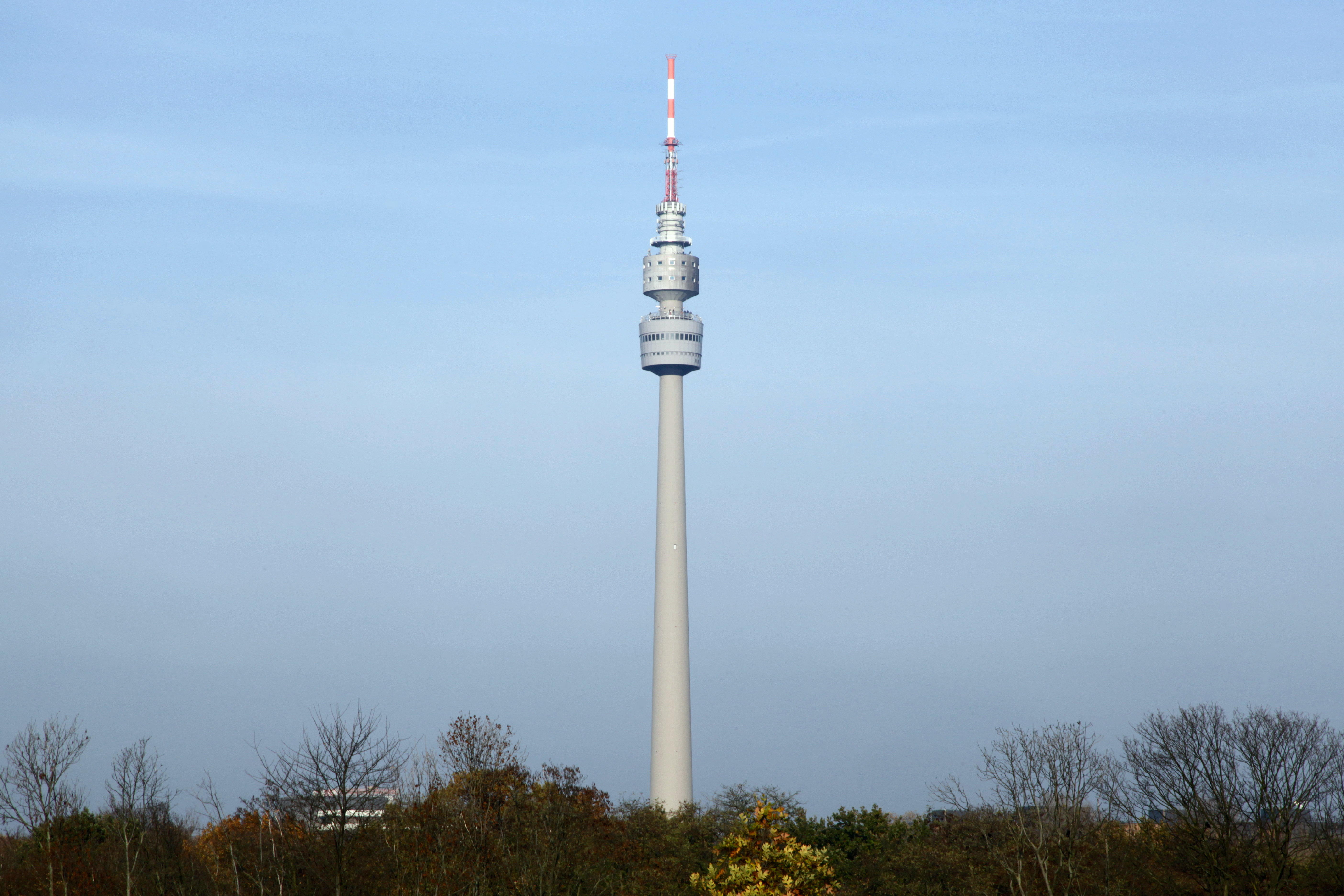 Blick vom Phoenix-Park zum Florianturm in Dortmund